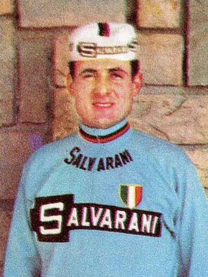 Figurina CAMPIONI dello SPORT 1967/68-n.234- DENTI - CICLISMO -Rec